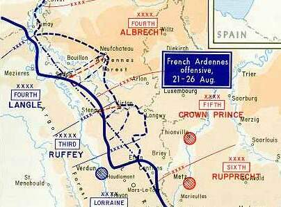 מפת איזור הקרב